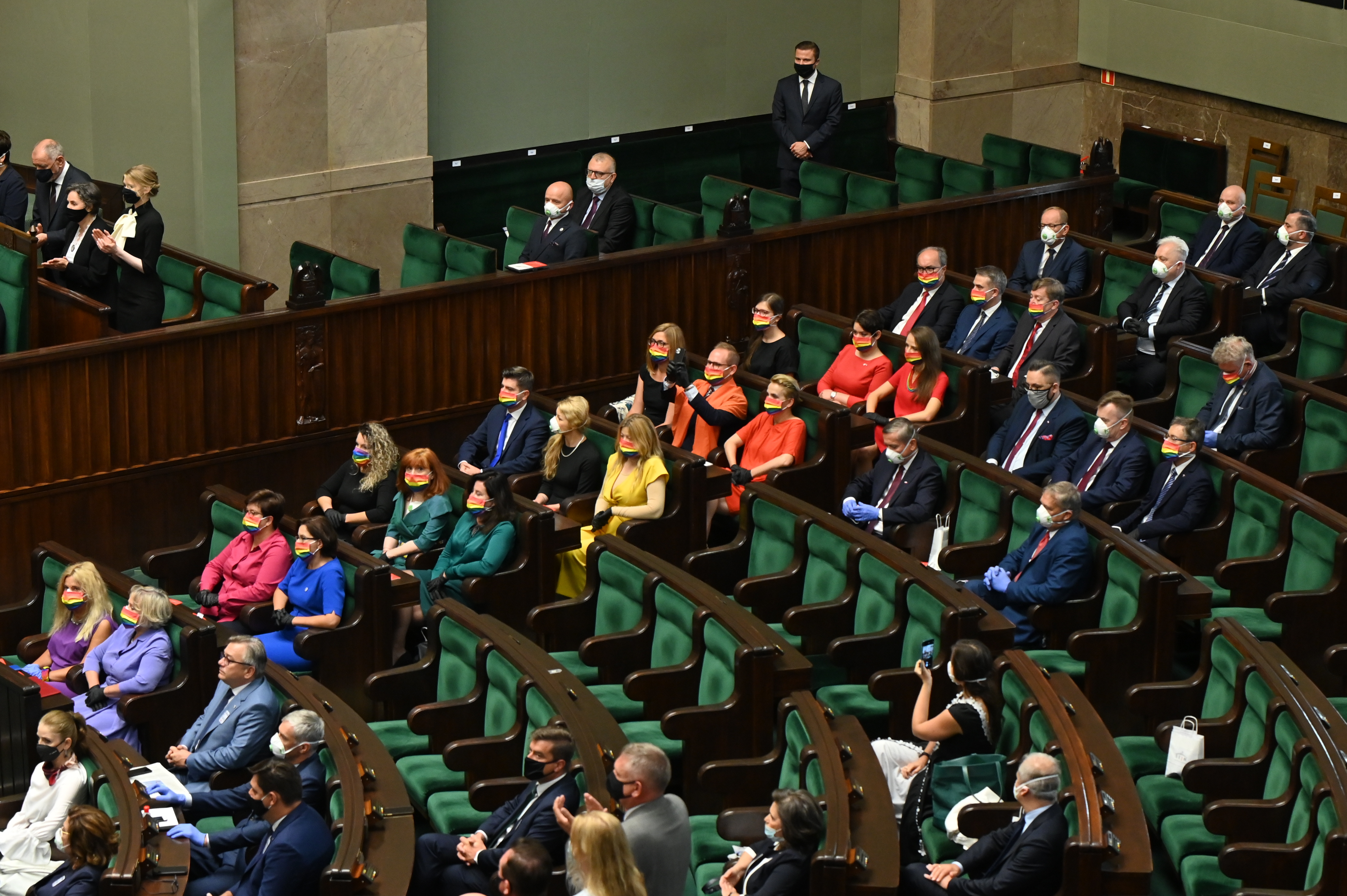 Fot. Kancelaria Sejmu/Aleksander Zieliński podczas uroczystość zaprzysiężenia Prezydenta RP Andrzeja Dudy przed Zgromadzeniem Narodowym